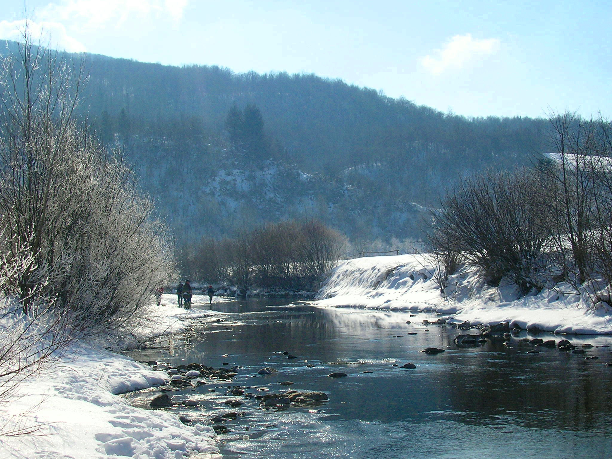 Aveto, pescatori all'apertura